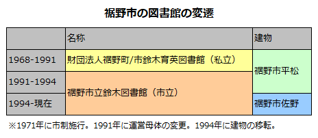 静岡県裾野市の図書館の変遷を表した図。